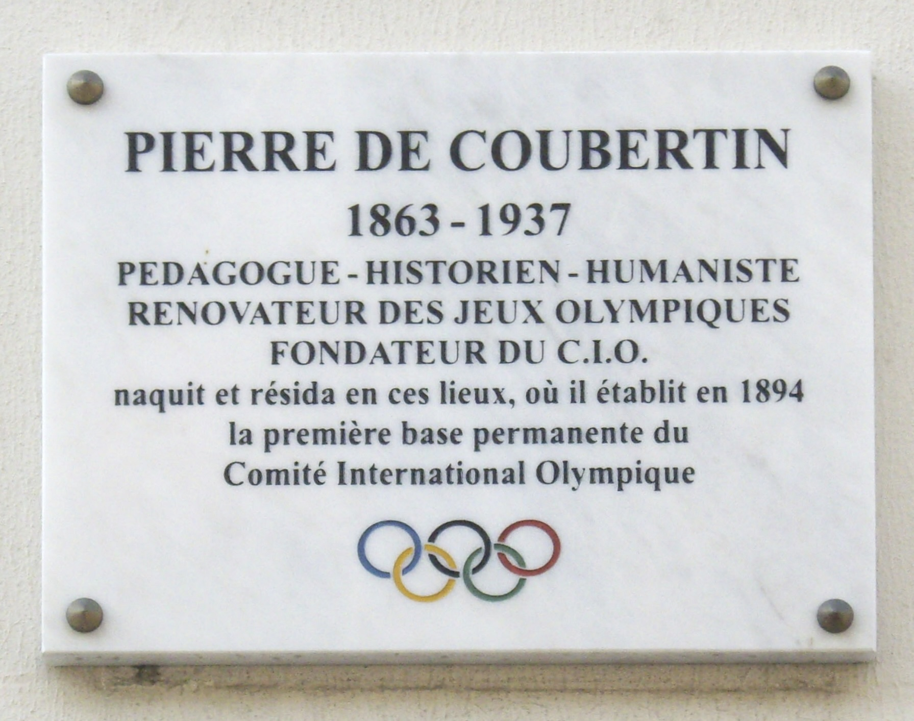 Plaque apposée au n° 20 de la rue Oudinot, Paris 7e.PIERRE DE COUBERTIN (1863-1937)PEDAGOGUE - HISTORIEN- HUMANISTERENOVATEUR DES JEUX OLYMPIQUESFONDATEUR DU C.I.O.naquit et résida en ces lieux, où il établit en 1894la première base permanente duComité International Olympique